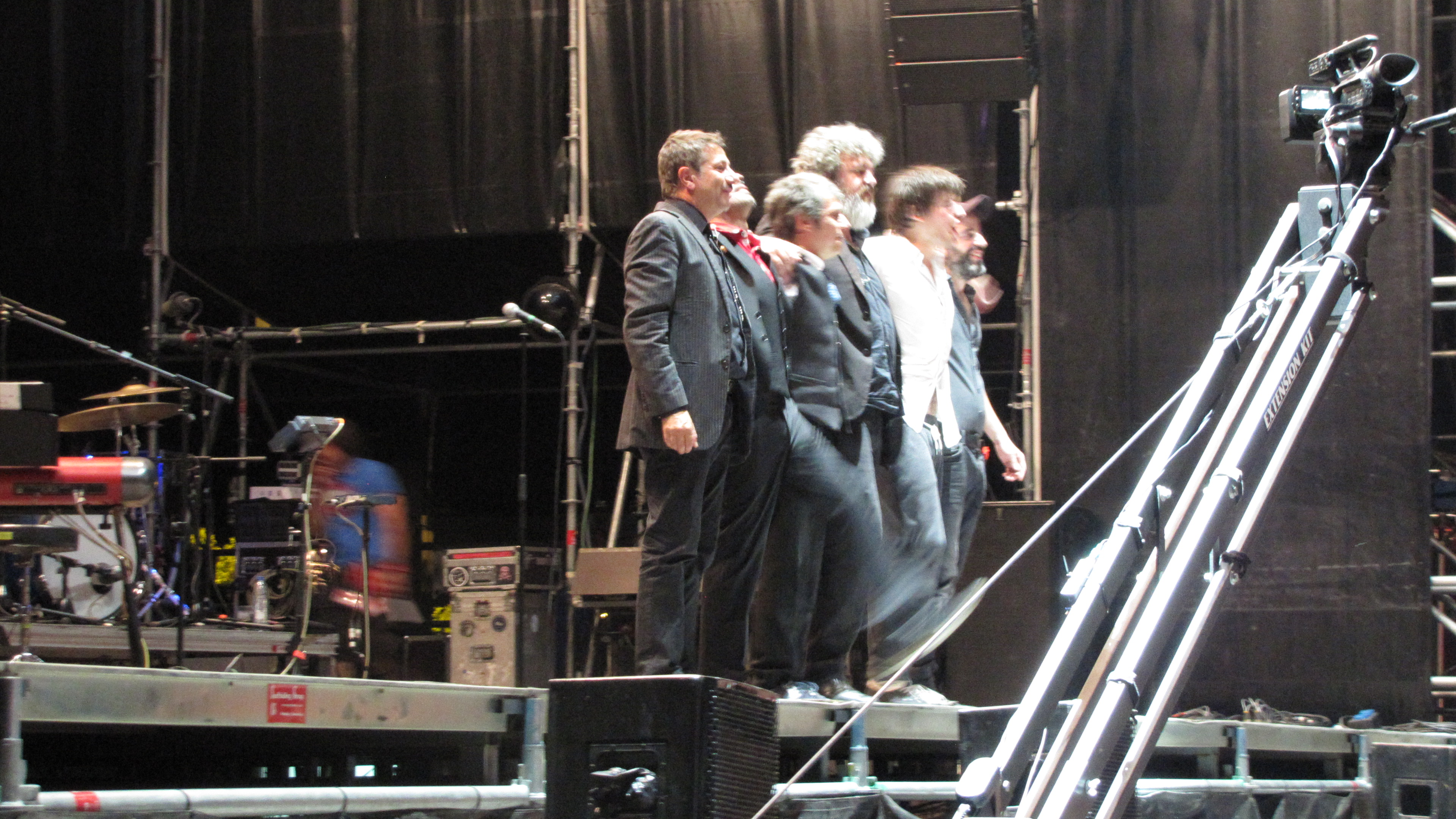 Concierto Ivan Ferreiro y Ricky Falkner (Egon Soda) en Sonorama 2014